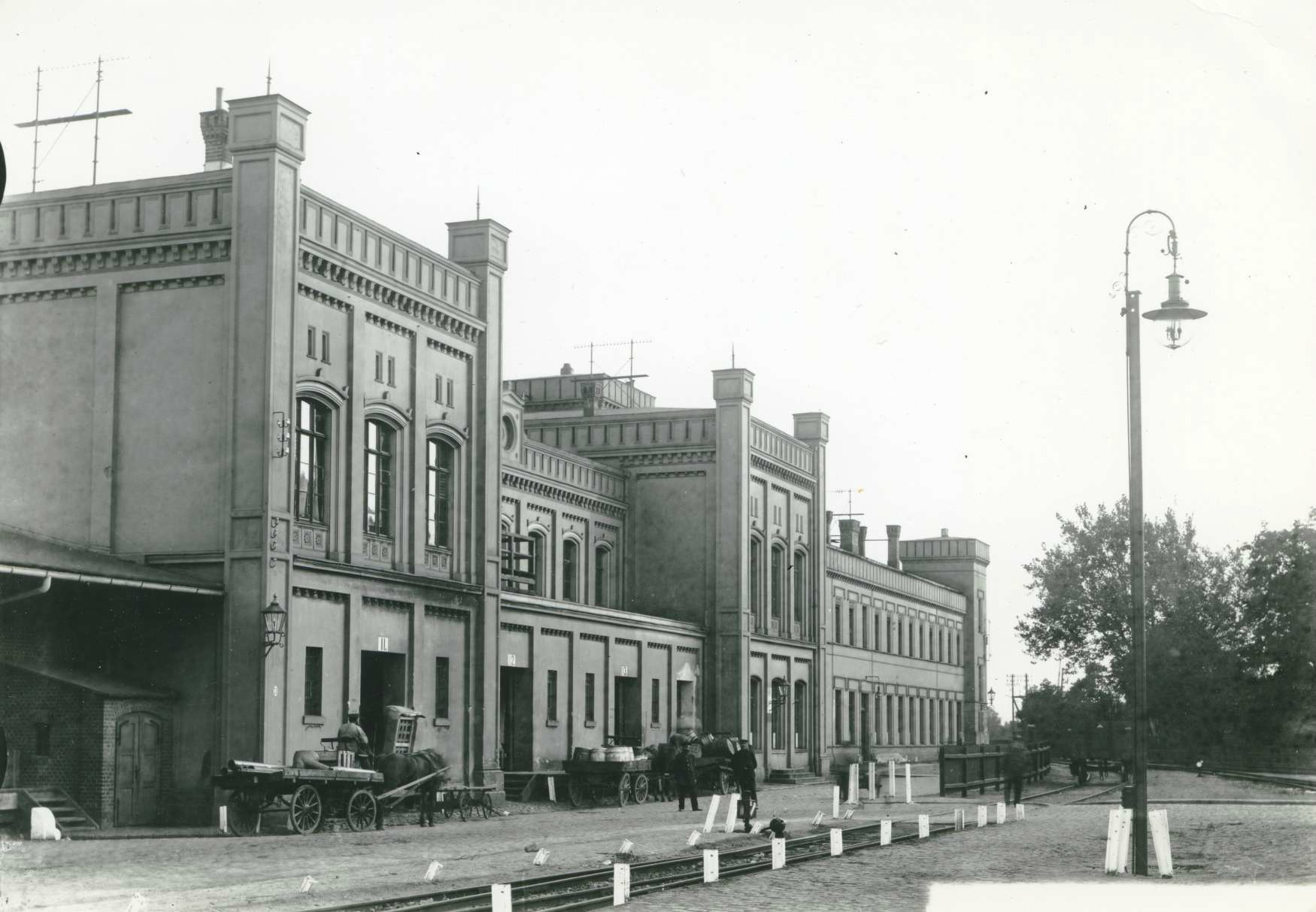 Nieistniejący dworzec kolejowy Gdańsk Brama Nizinna.